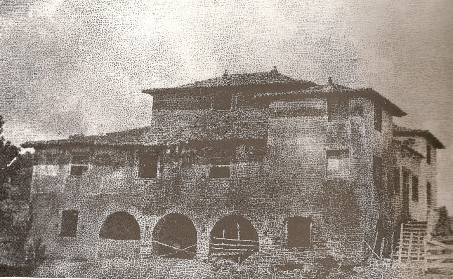 O antigo Solar de Megaípe, casa-grande do Engenho Megaípe (fundado antes de 1623) que foi dinamitada em 1928. Jaboatão dos Guararapes, Pernambuco, Brasil.